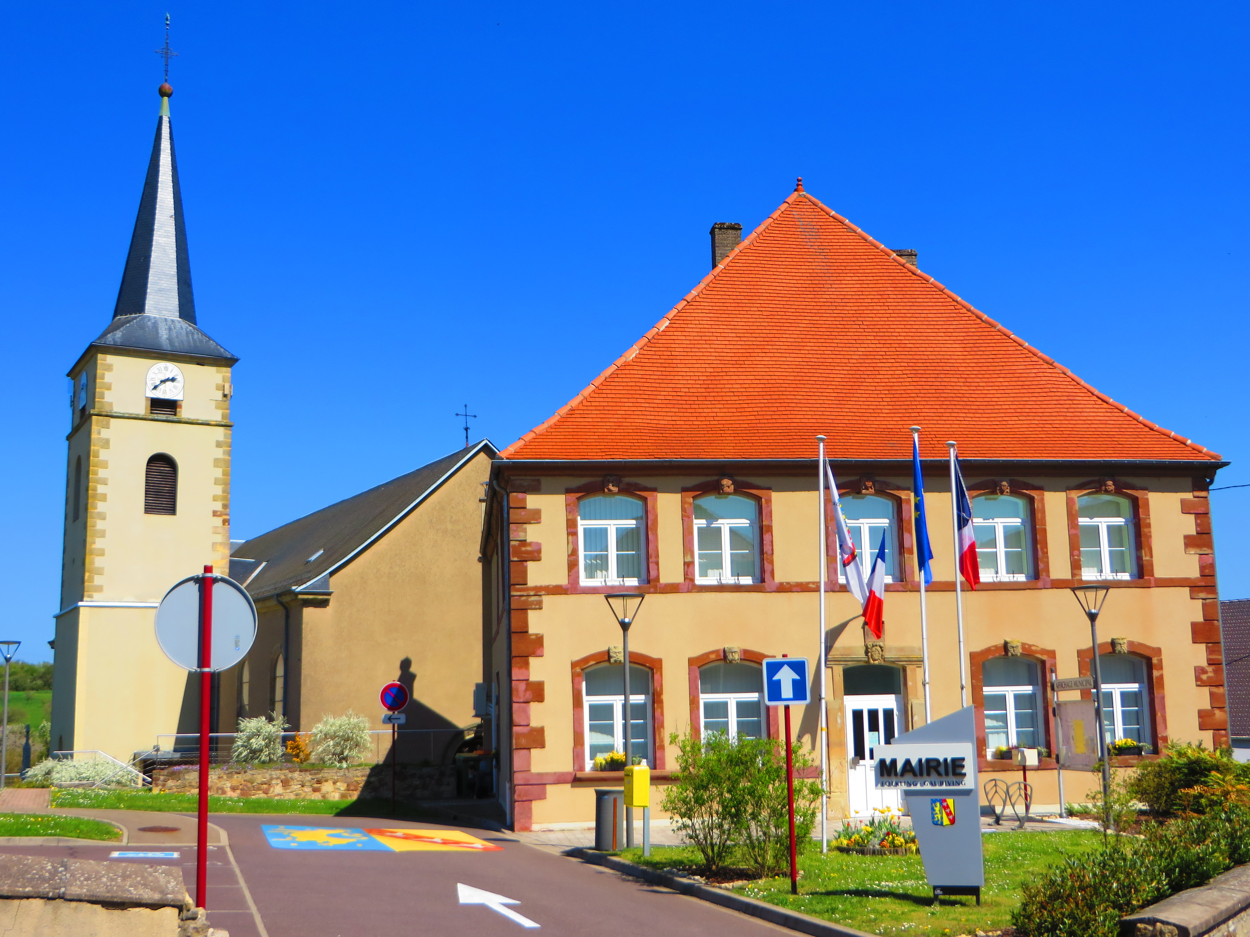 Folkling eglise